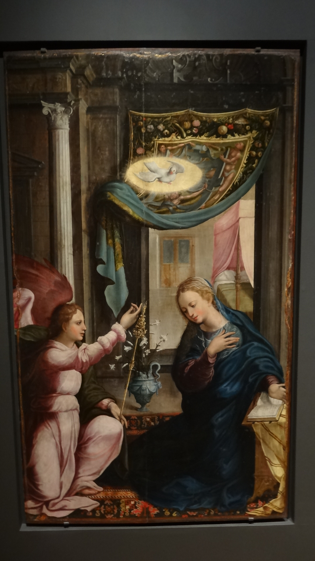 Anunciação é uma pintura a óleo de c. 1550-60 pintado por oficina portuguesa para o Retábulo da Matriz de Santa Cruz, na ilha da Madeira.